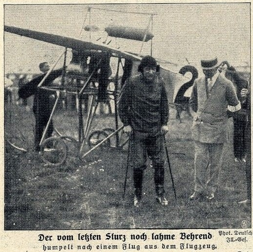 Flugpionier Adolf Behrend nach einem Sturz, Nationale Flugwoche in Johannisthal August 1910